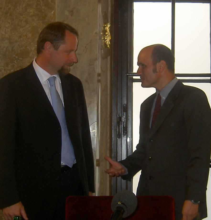 Martin Říman a Ivan Brezina